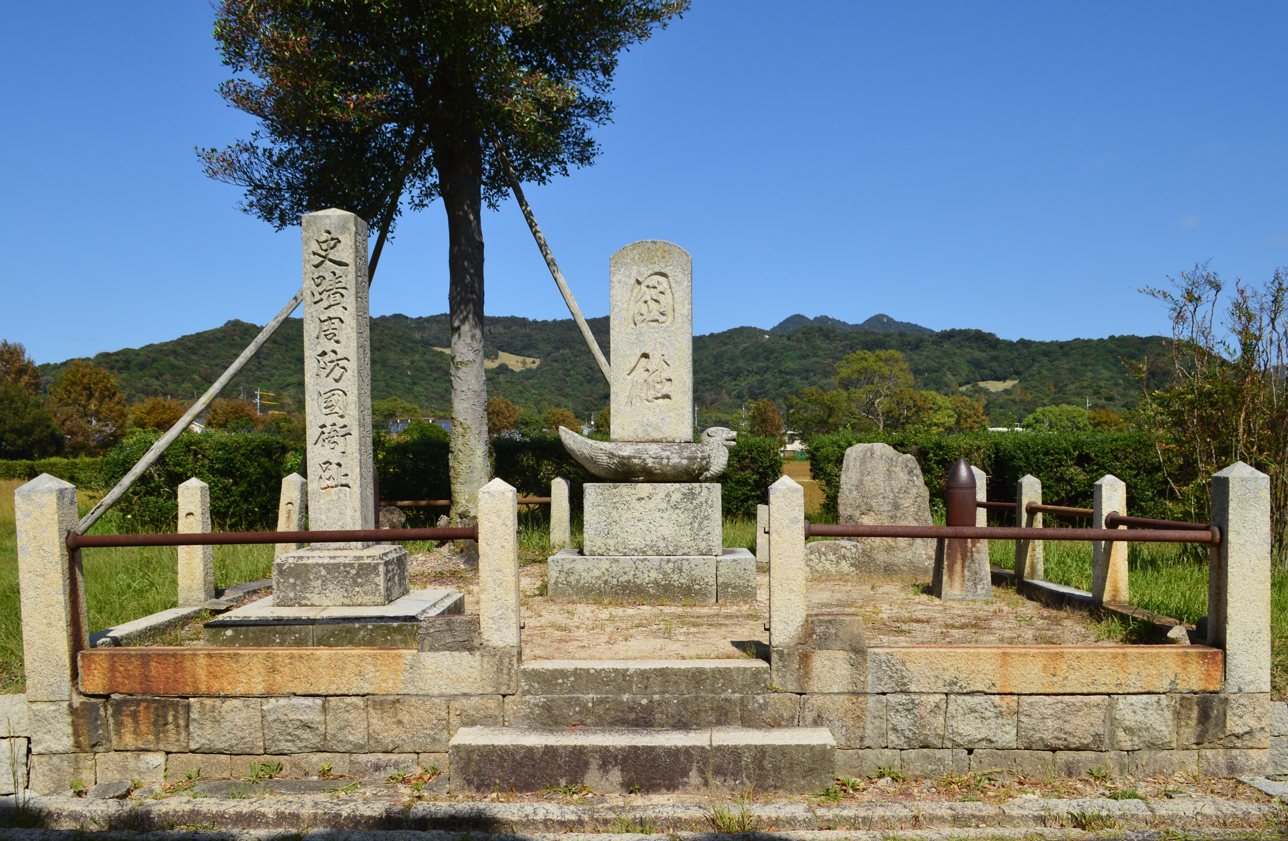 周防国衙跡 石碑